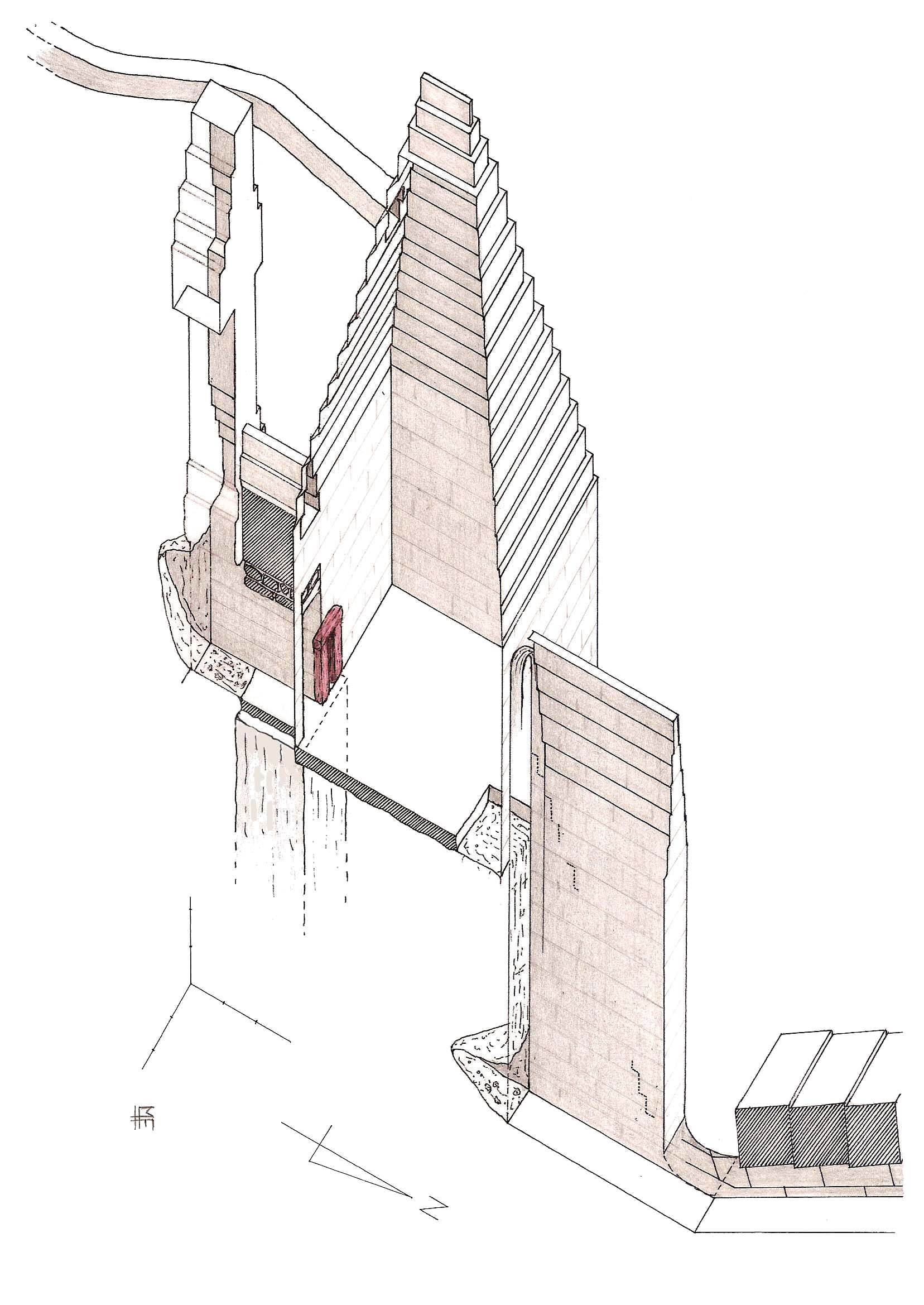 Vue axonométrique des appartements funéraires de la pyramide rhomboïdale de Snéfrou à Dahchour, détails de la chambre inférieure